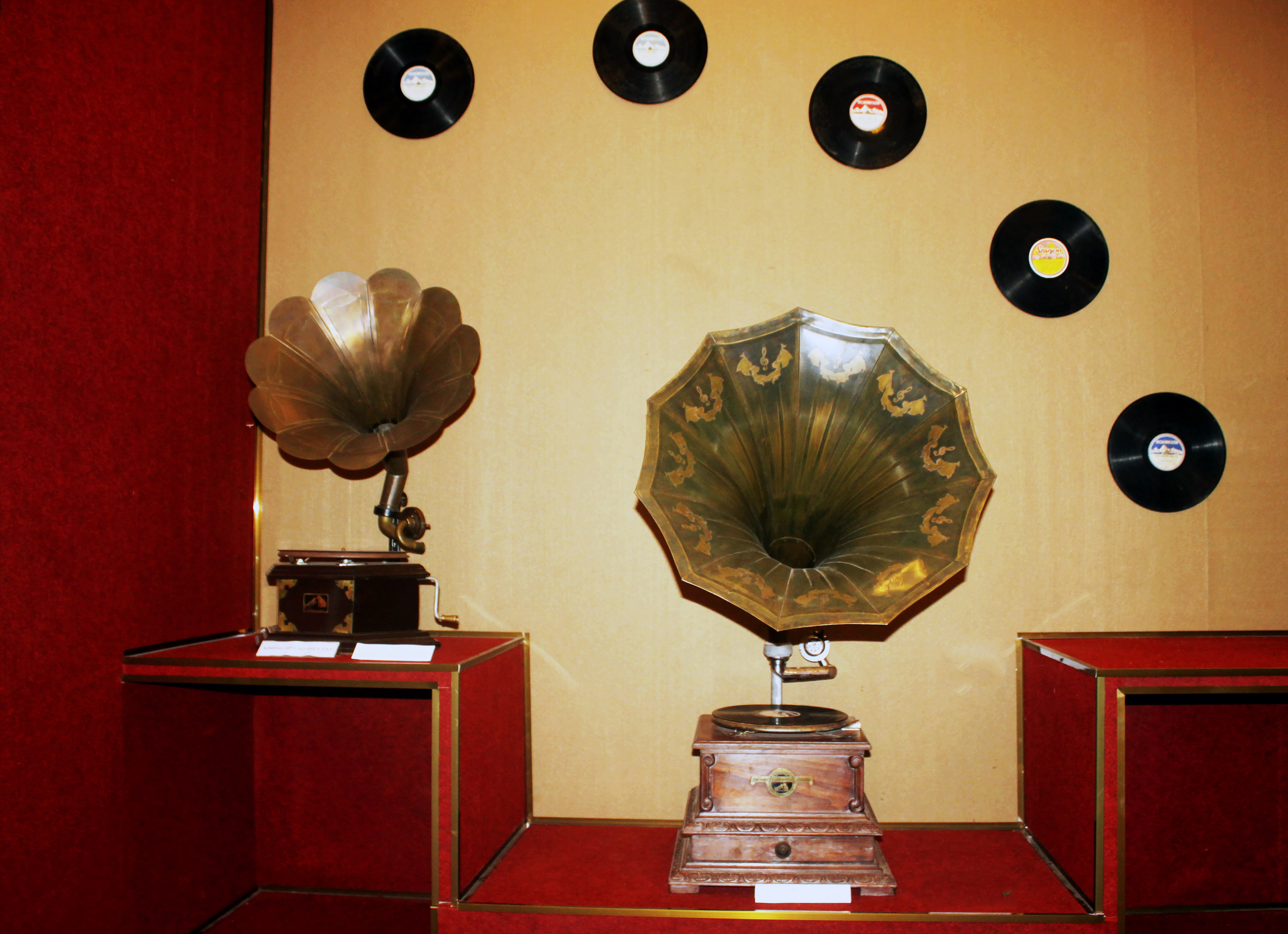 Máy hát đĩa và đĩa hát có từ thời Pháp thuộc ở Việt Nam.